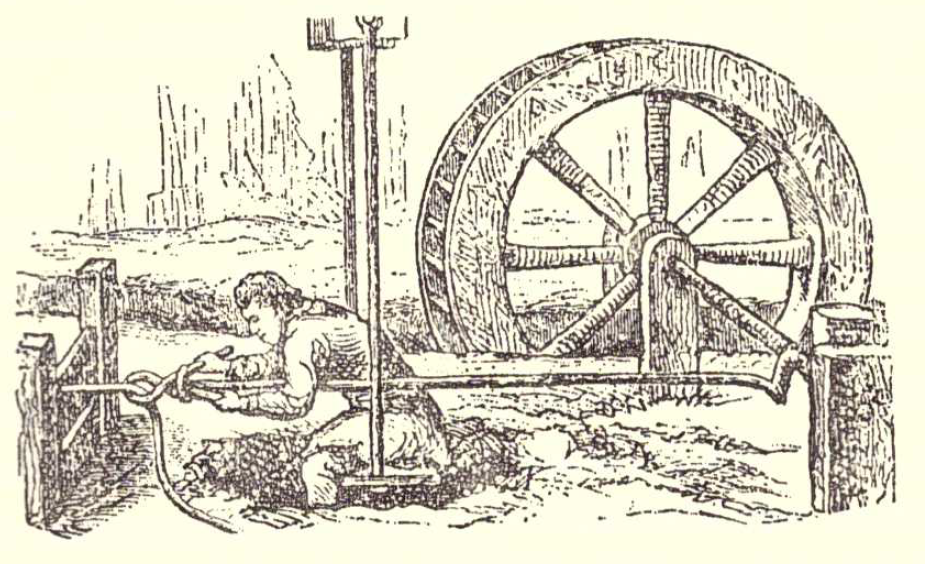 Drahtzieher